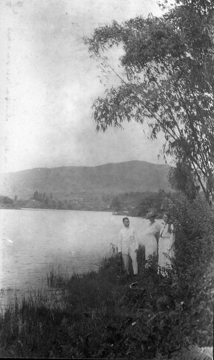 Foto. Het meer Sitoe Tjileuntja nabij Pengalengan ten zuiden van Bandoeng op West- Java